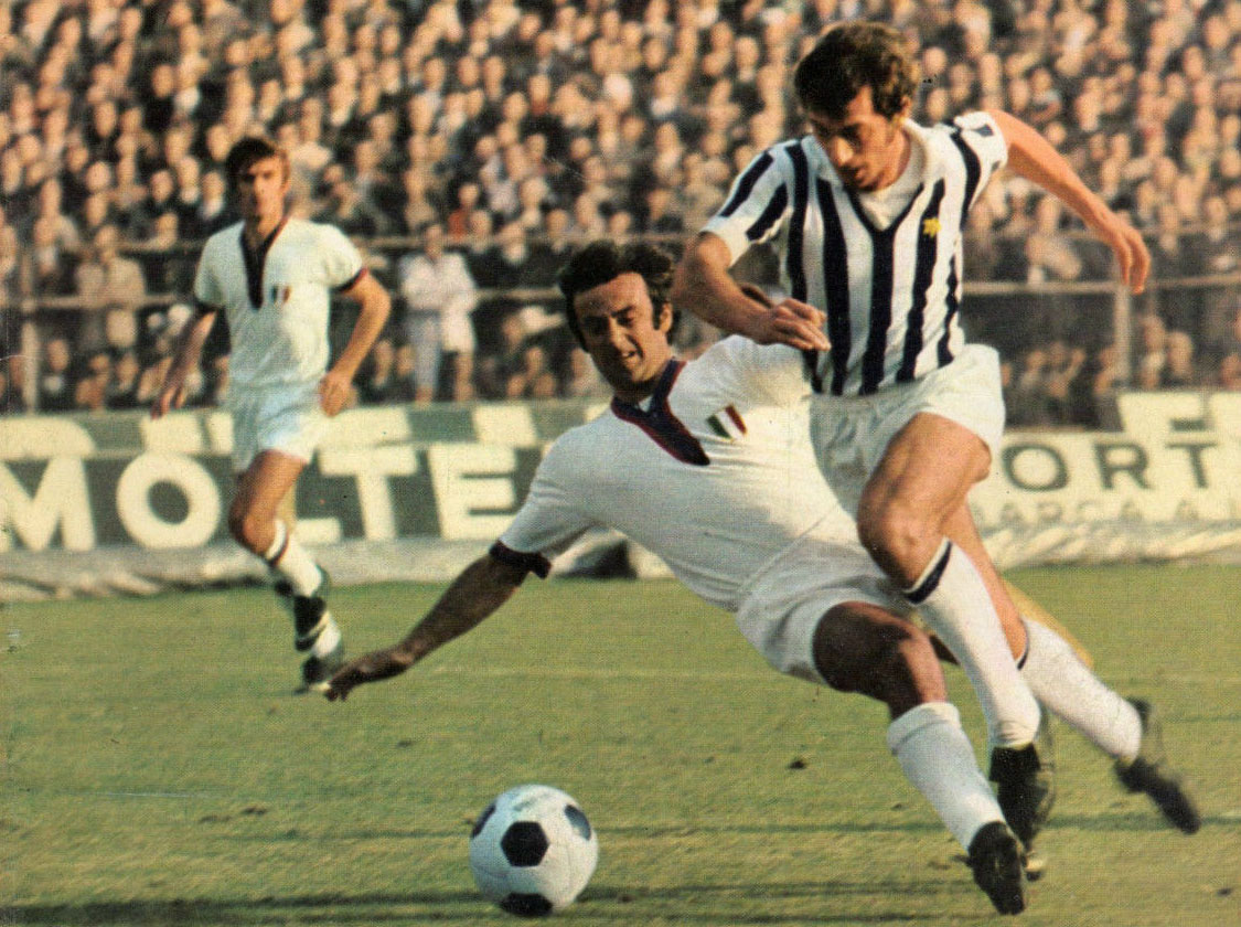 Torino, stadio Comunale, 15 novembre 1970. L'attaccante bianconero Adriano Novellini (a destra) contrastato da un avversario rossoblù nel corso della sfida tra Juventus e Cagliari (2-1) valevole per la 6ª giornata del campionato italiano di Serie A 1970-71.